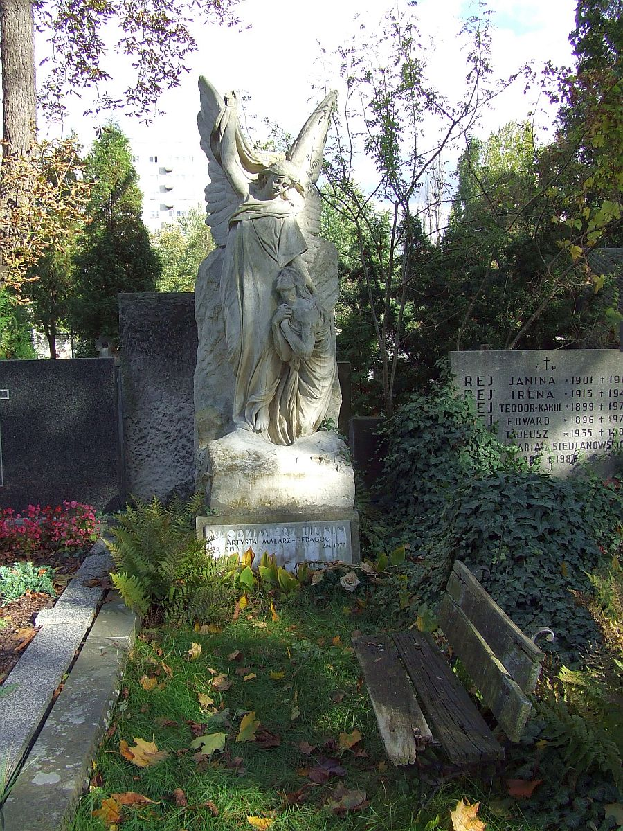 Włodzimierz Tiunin, Cmentarz Ewangelicko-Augsburski w Warszawie